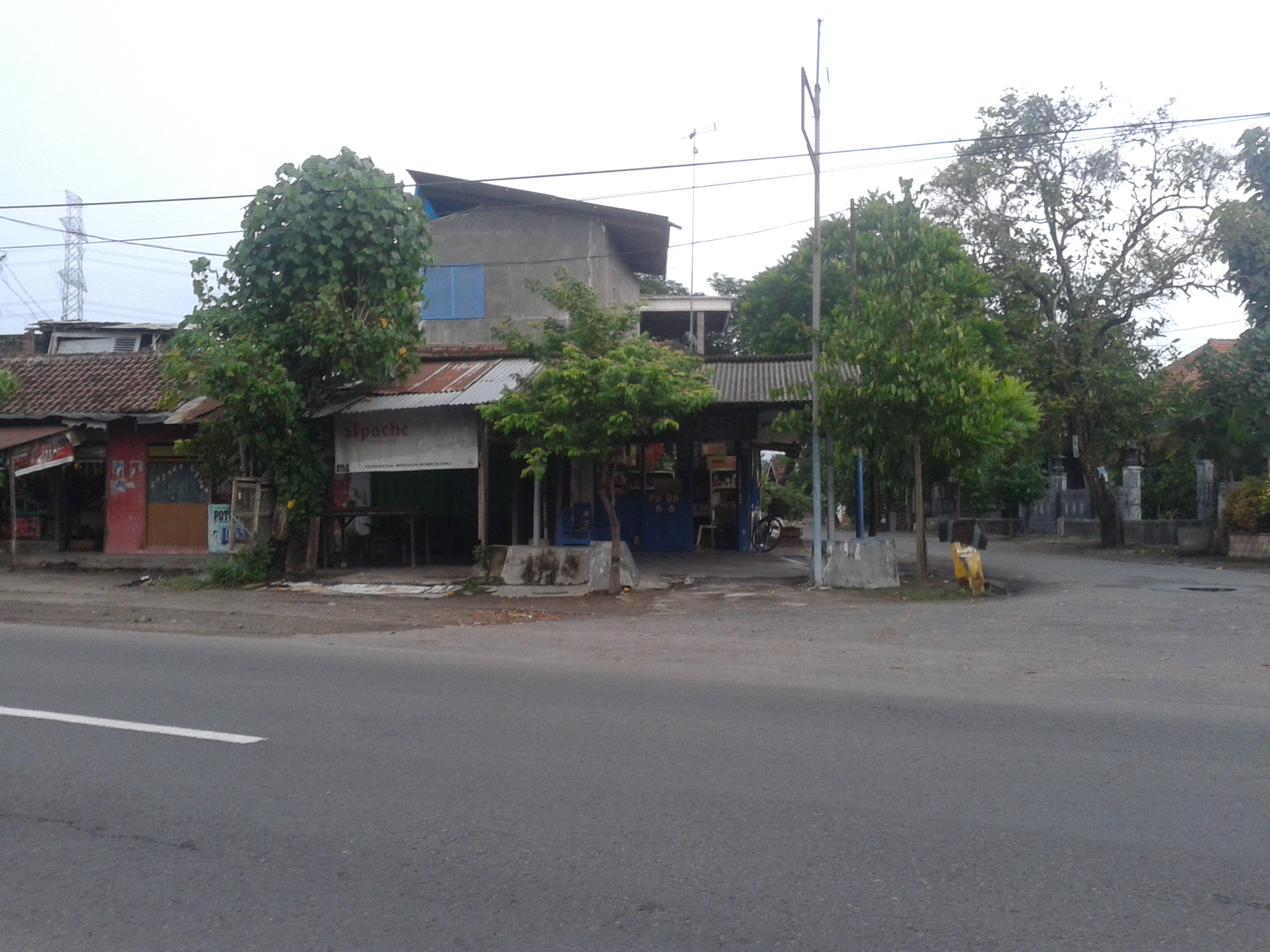 Halte Banjaranyar